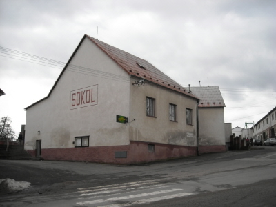 Sokolovna Puklice, budova bývalého pivovaru